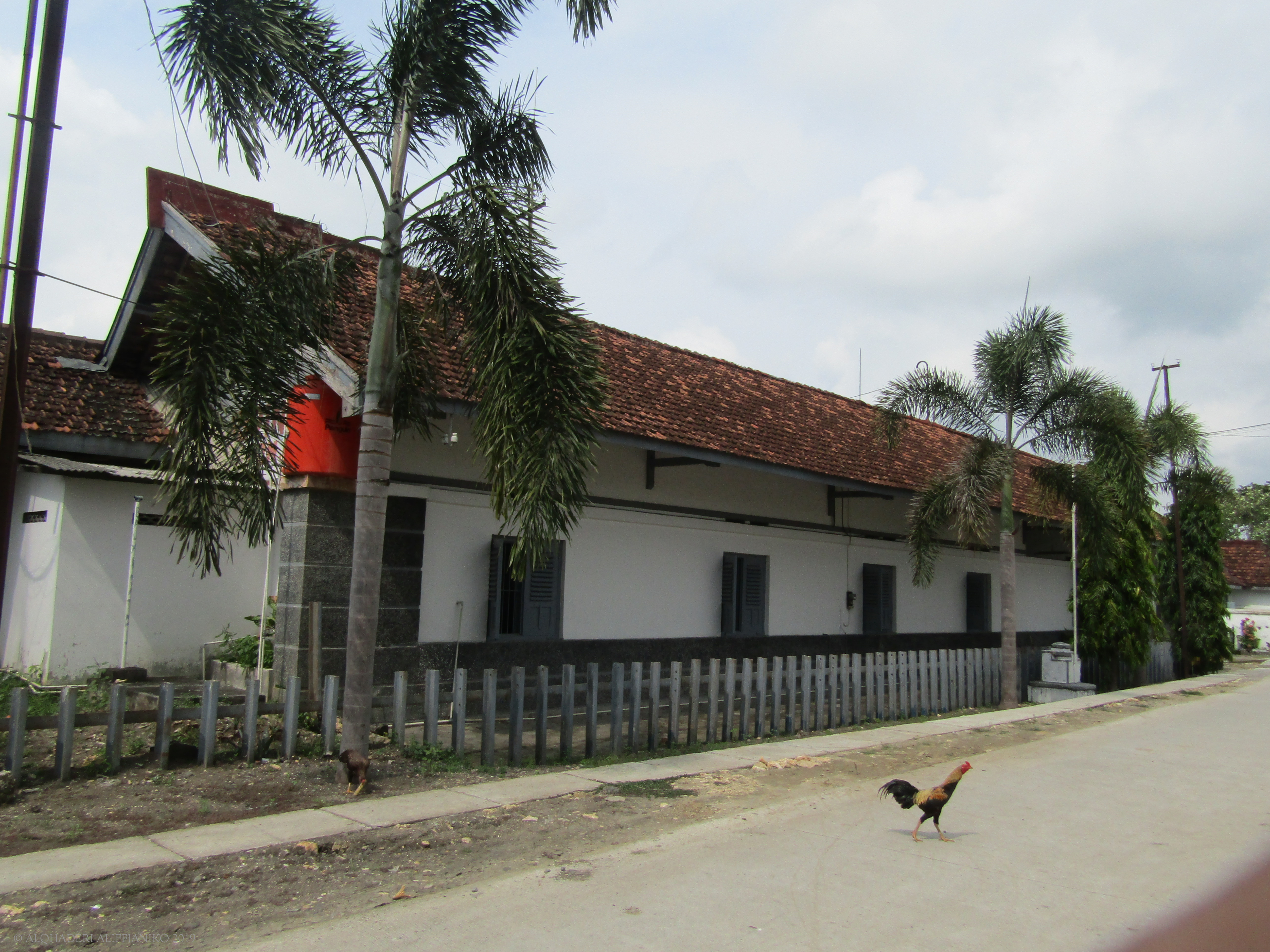 Tampak depan perspektif Stasiun Gambringan, 2019